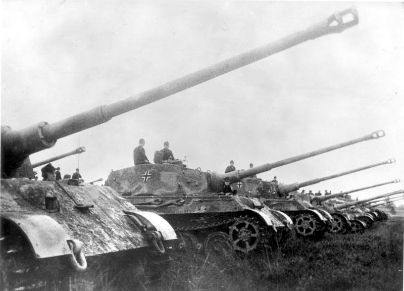 ... und nun der "Königstiger". Ein Wunderwerk deutscher Technik entstand in dem neuen Panzertyp "Königstiger". Aus seinem mächtigen schwergepanzerten Stahlleib ragt drohend das riesige Rohr eines tausendfach bewährten Flakgeschützes. Einsatzbereit stehen sie in Reih und Glied. Foto: Hamann